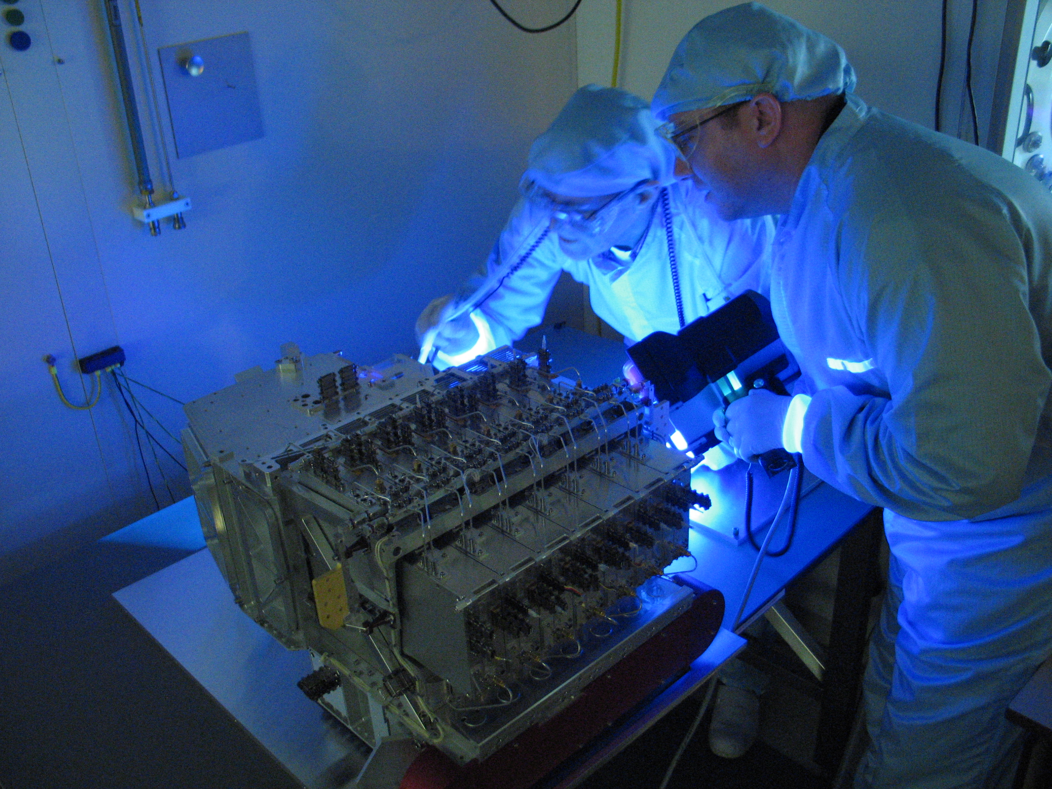 Het HIFI-instrument, gebouwd onder leiding van SRON, wordt in de schone kamers gecontroleerd met black light. Eventuele stofdeeltjes worden met een marterharen penseel verwijderd.